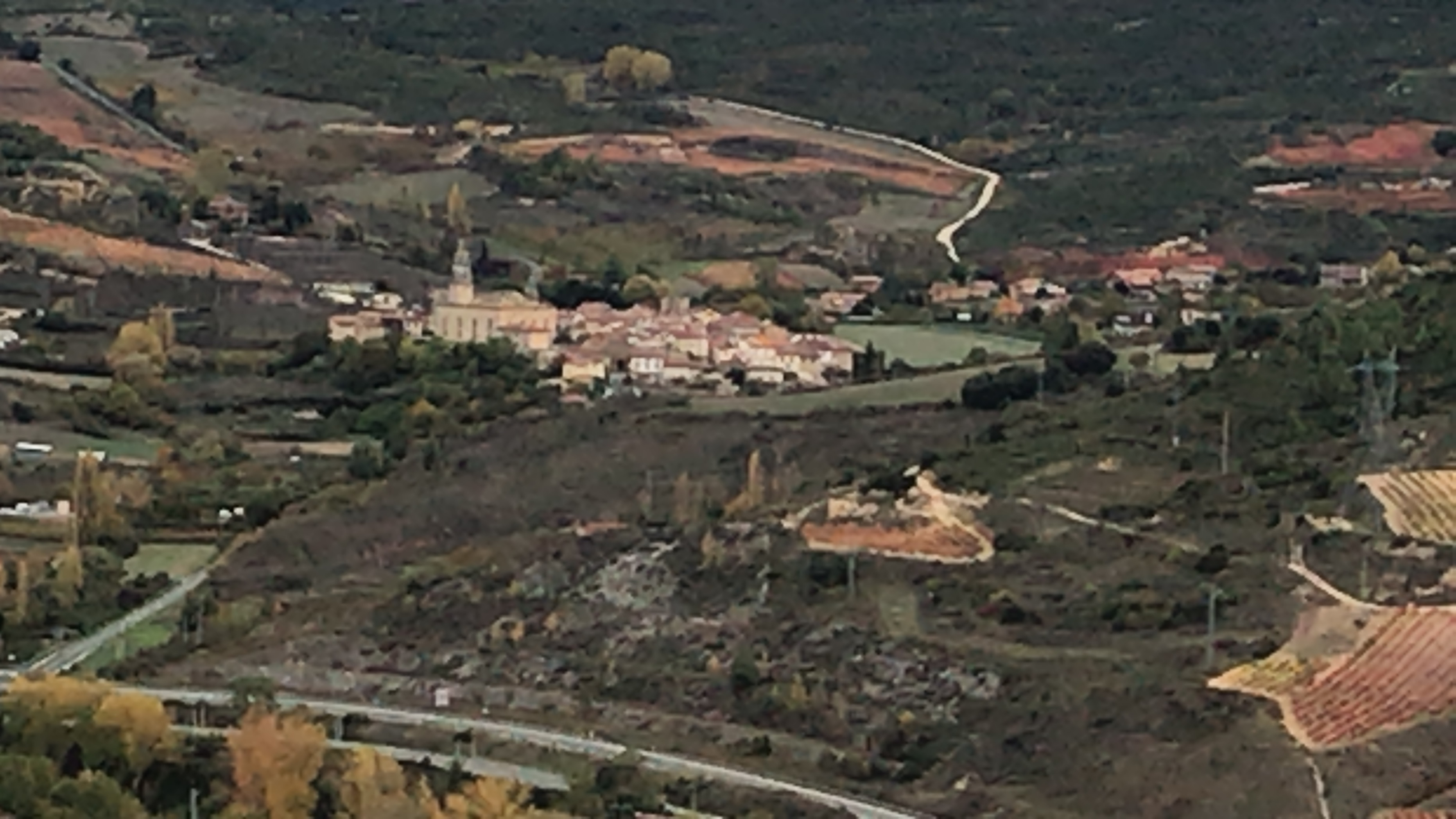 Vista general de Salinillas de Buradón en Álava (País Vasco, España)